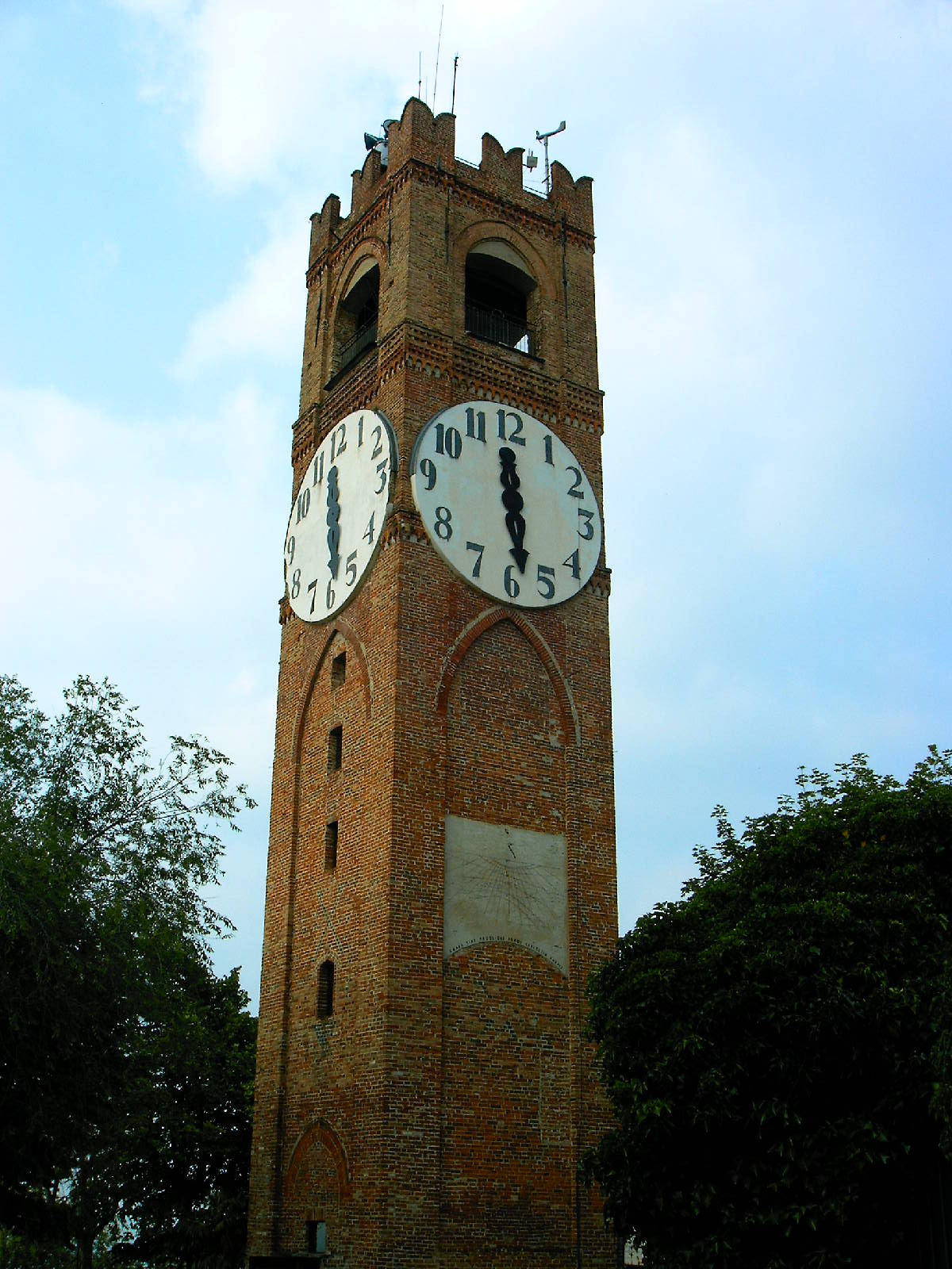 Torre Civica al Belvedere, Mondovì, Italy